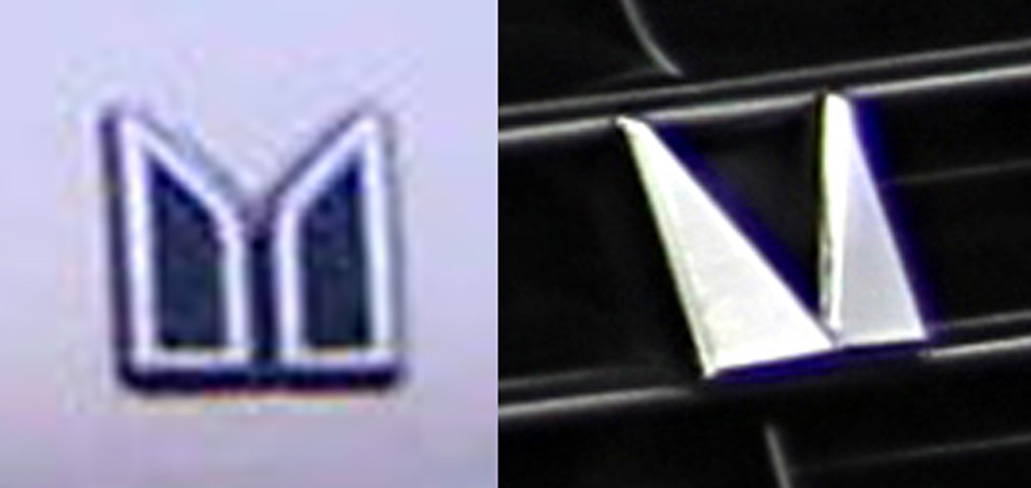 いすゞ、および三菱自工のCI比較画像 この素材は、以下のWikipedia上のパブリック・ドメイン画像からエンブレム部分を切り取ったものである。 File:Isuzu Gemini Coupé, nineties.jpg (いすゞ・ジェミニ) File:2nd generation Mitsubishi Galant Σ Turbo.jpg (三菱・ギャランΣ)